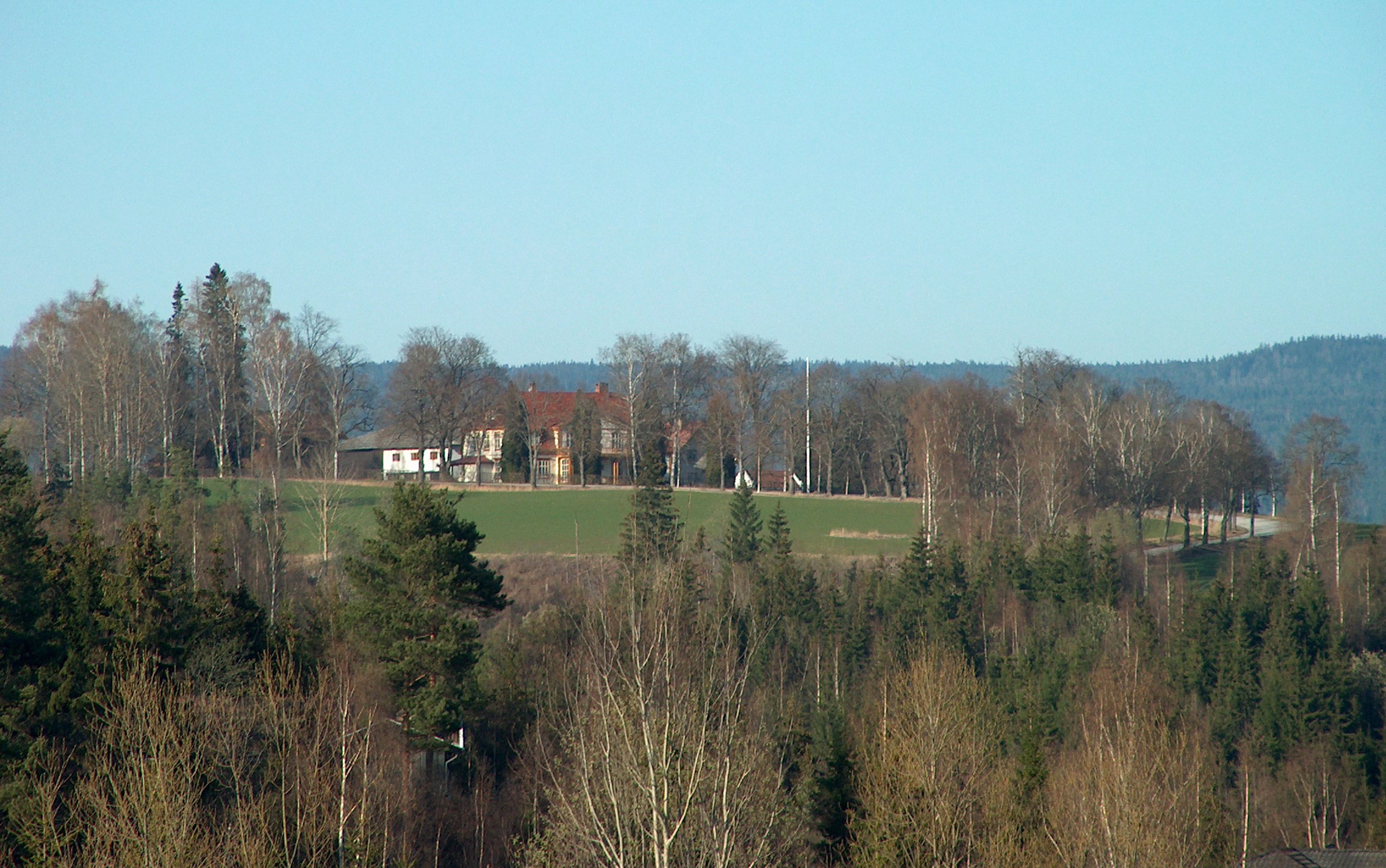 Follum gård, Ringerike